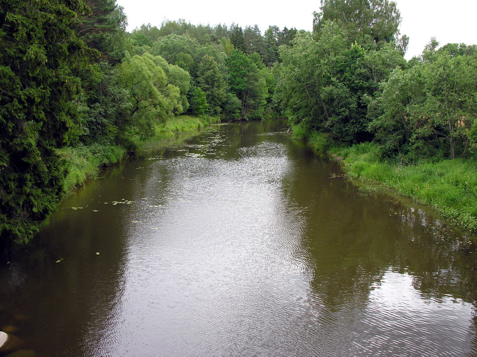 Virvytė ties Gyvoliais Foto: Algirdas, 2006 m. liepos 18 d., Lietuva